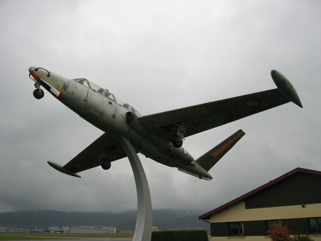 Jet Fouga Magister de l'aérodrome de Pontarlier - Franche Comté - France